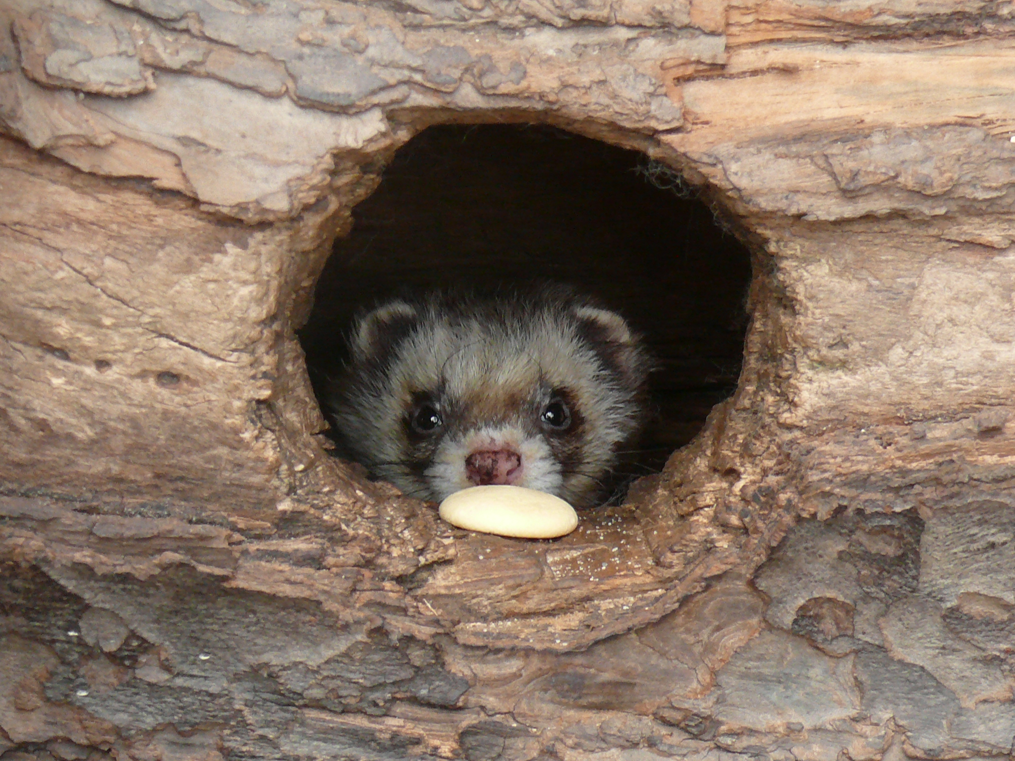 Fretka domácí (Mustela putorius furo) Systém: Řád: ŠELMY /Carnivora/ Čeleď: LASICOVITÍ /Mustelidae/ Handicap: Domestikované zvíře. Charakteristika: Fretka domácí byla domestikována z tchoře tmavého (Mustela putorius). Je to jediná domestikovaná lasicovitá šelma a spolu se psem a kočkou jedna ze tří domestikovaných šelem obecně. Je chována v řadě barevných variet, od albinotických až po celé čistě černé. Rozměry: Délka těla 28 – 46 cm plus 14 – 18 cm dlouhý ocas, hmotnost 0,6 – 1,8 kg. Samice je menší než samec. Rozmnožování: Fretky pohlavně dospívají v 5 – 9 měsících života. Páří se v období od března do srpna. Samice jsou březí 42 dní a rodí 1 – 16 mláďat ve vrhu. Mláďata po porodu váží 6 – 12 g a jsou ještě holá. Odstav probíhá ve věku 6 – 8 týdnů. Početnost a výskyt v ČR: Fretky jsou chovány jako domácí mazlíčci. Existují dokonce i jejich chovné stanice. Bohužel však stejně tak jako psi či kočky mnohdy končívají na ulicích a nebo jsou vypouštěny do přírody, kam nepatří.